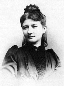 Julie de Boor, um 1875 (geschätzt)